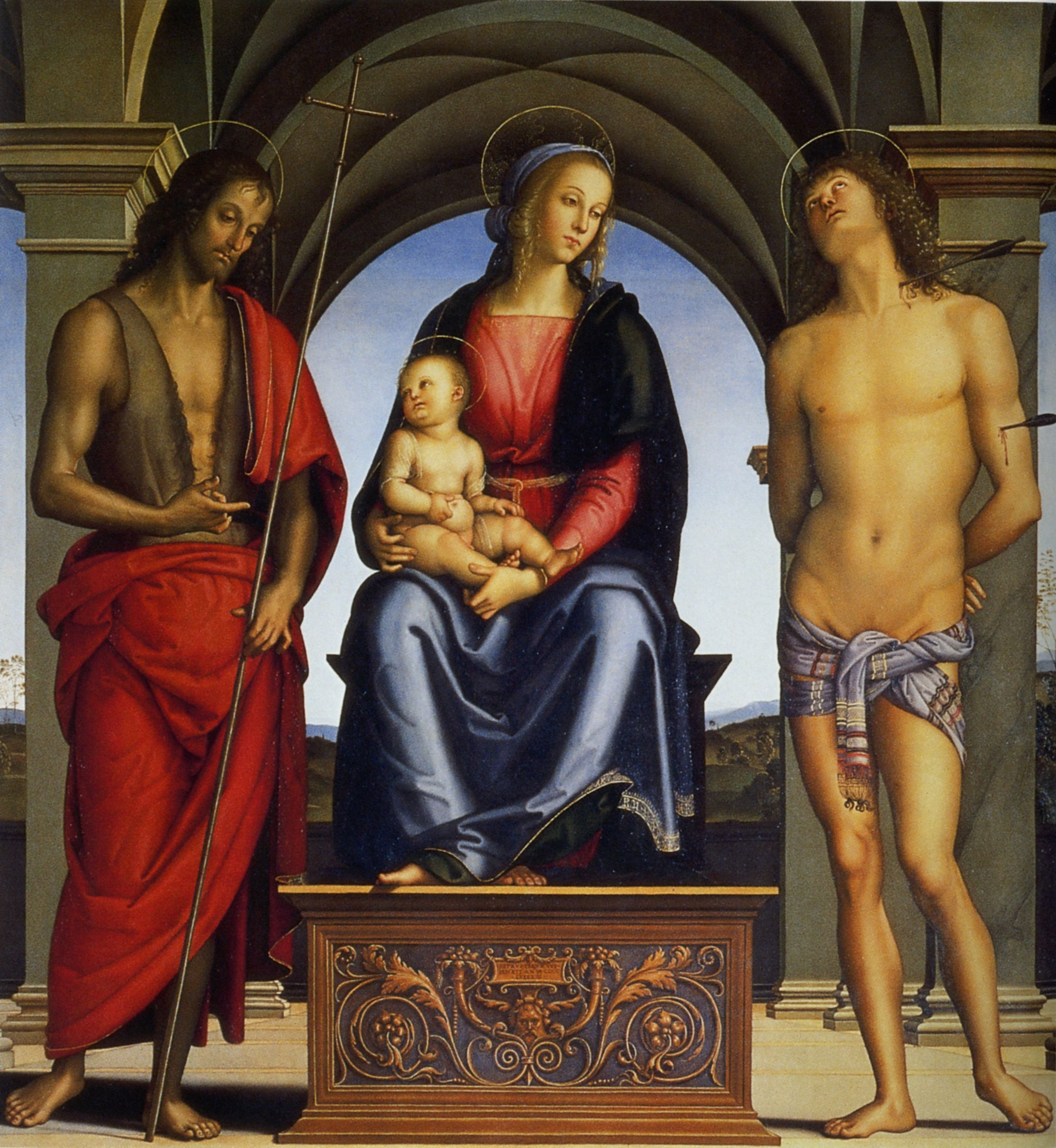 Pietro Perugino: Madonna in trono col Bambino tra i Santi Giovanni Battista e Sebastiano. Cat. no. 30 in Vittoria Garibaldi: Perugino. Catalogo completo. Octavo, Firenze 2000, ISBN 88-8030-091-1